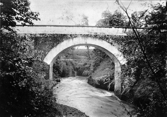 Foto. De boogbrug over de Sogra-rivier bij Pliken-Lor door Waterstaat gebouwd en gezamenlijk betaald door de suikerfabriek en het Gouvernement, Midden-Java